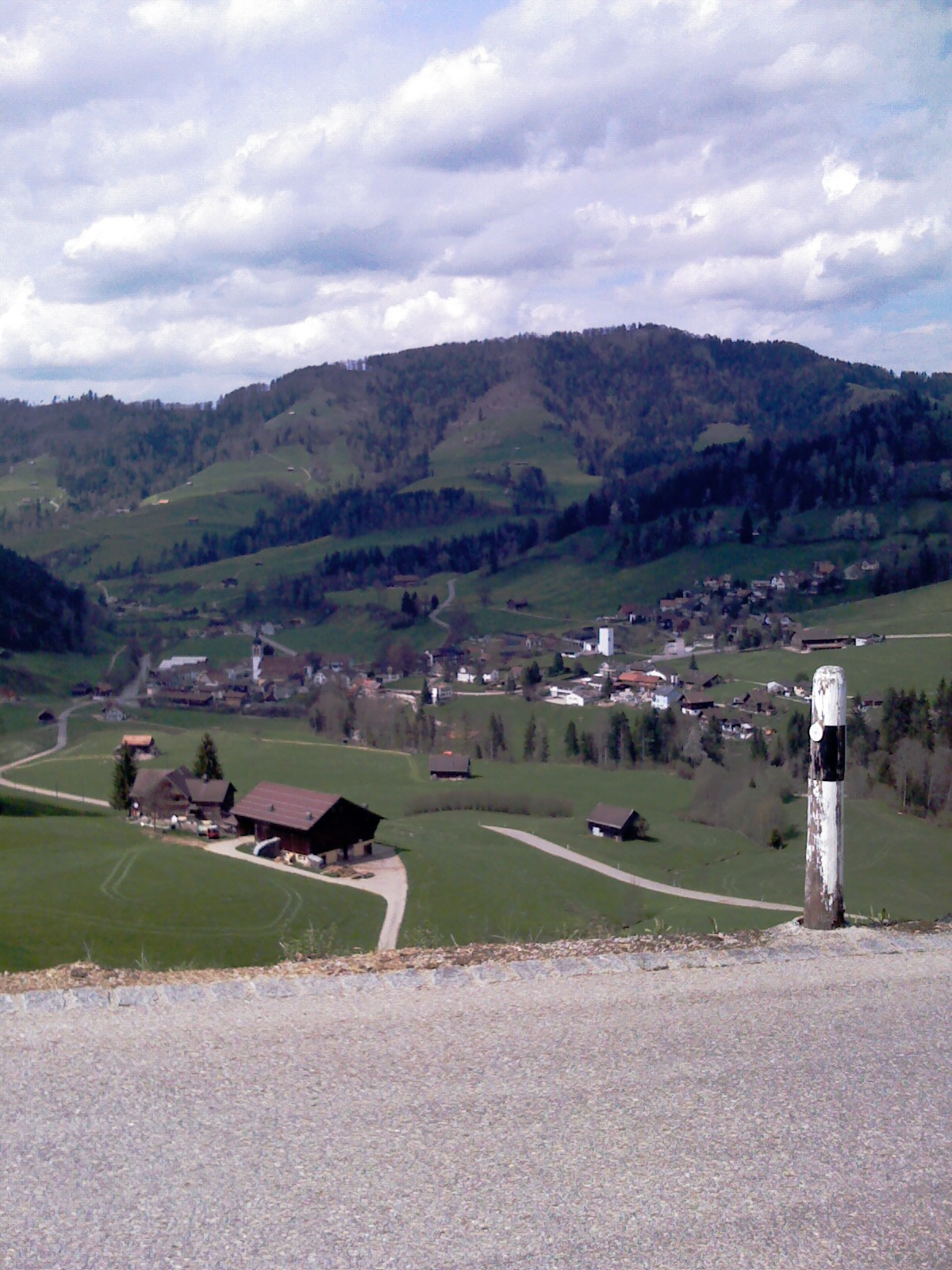 St. Peterzell, Toggenburg, Switzerland - Sankt-Peterzell en Togenburgo, Svislando